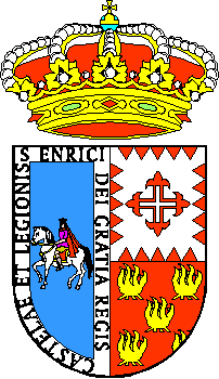 Escudo del concejo Asturiano de Ponga